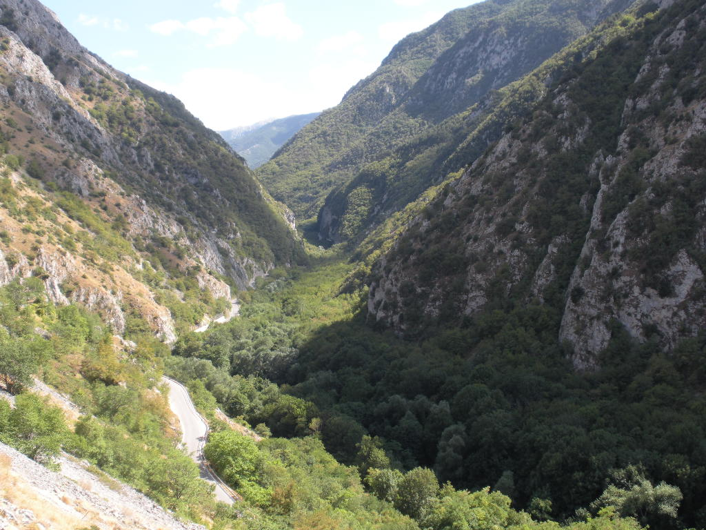 Veduta delle Gole del Sagittario